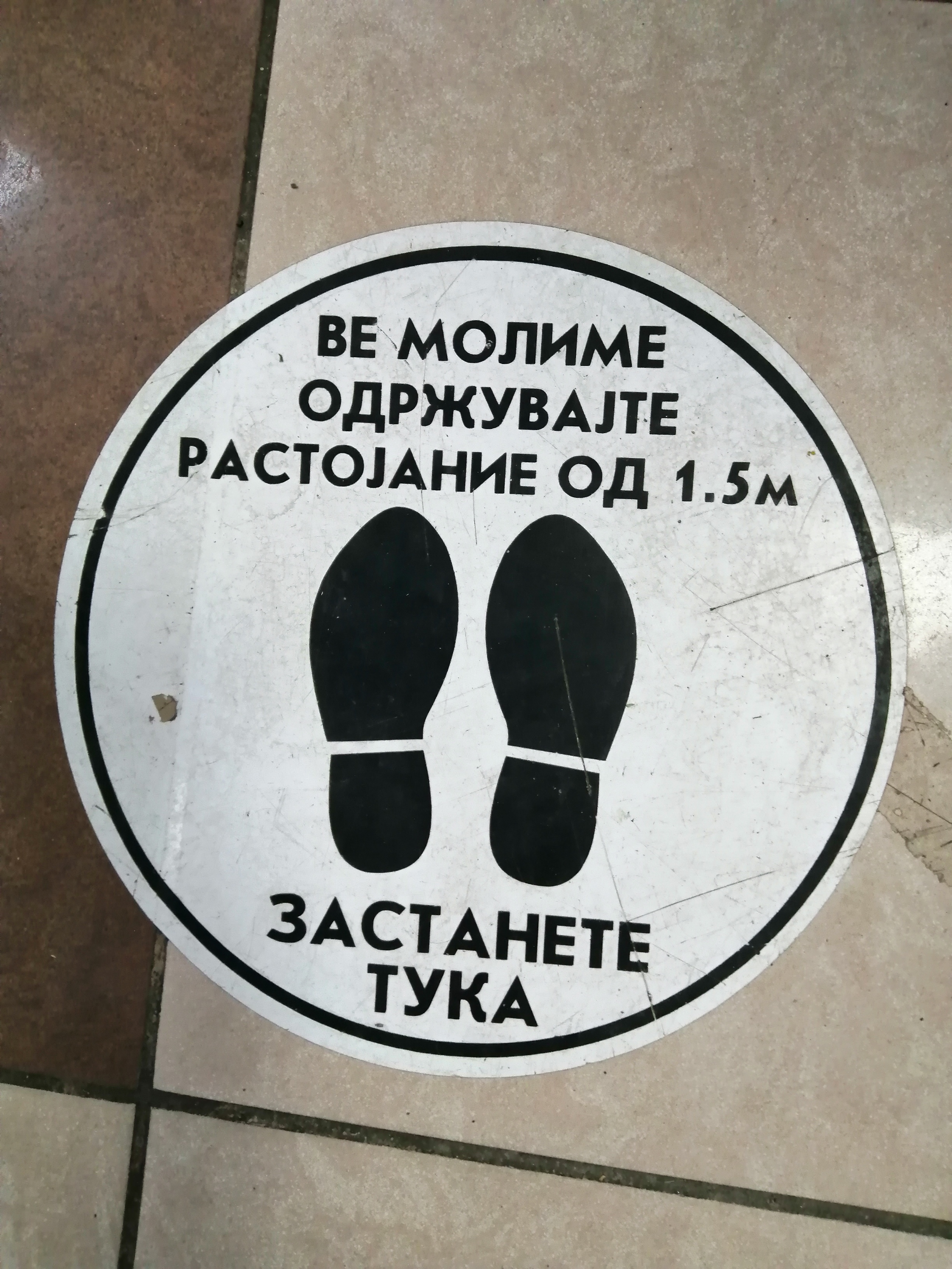 Знак за социјално дистанцирање